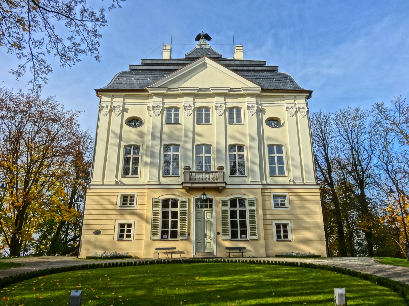 Barokowy pałac (poł. XVIII w.) w Ostromecku k. Bydgoszczy, zwany Starym zbudowany w stylu saskiego rokoka na polecenie wojewody pomorskiego Pawła Michała Mostowskiego